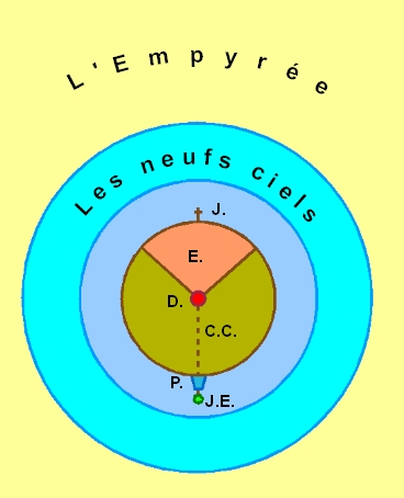 Géographie de la Divine Comédie de Dante